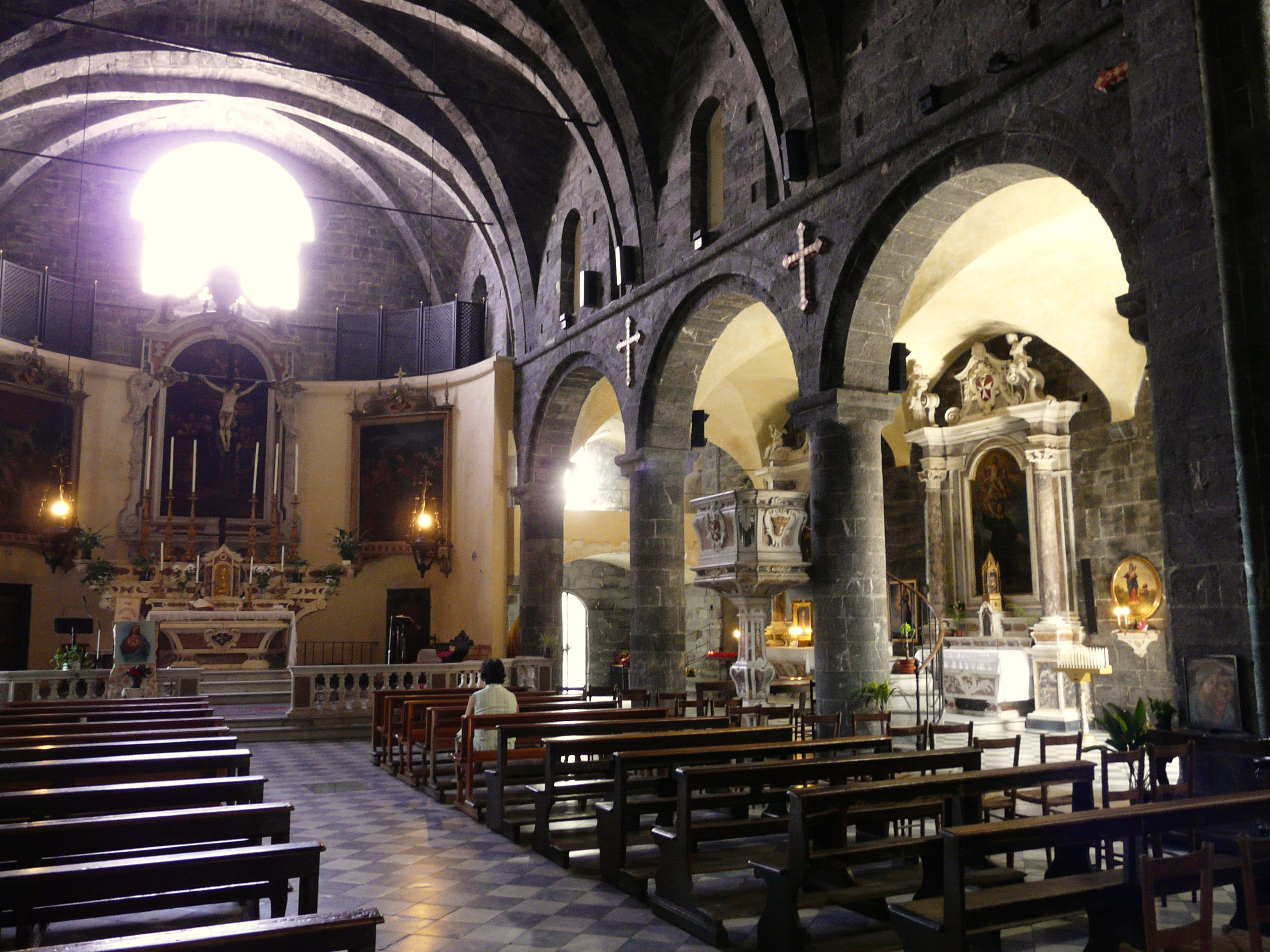 Commenda di San Giovanni di Pré, Genova, Liguria, Italia